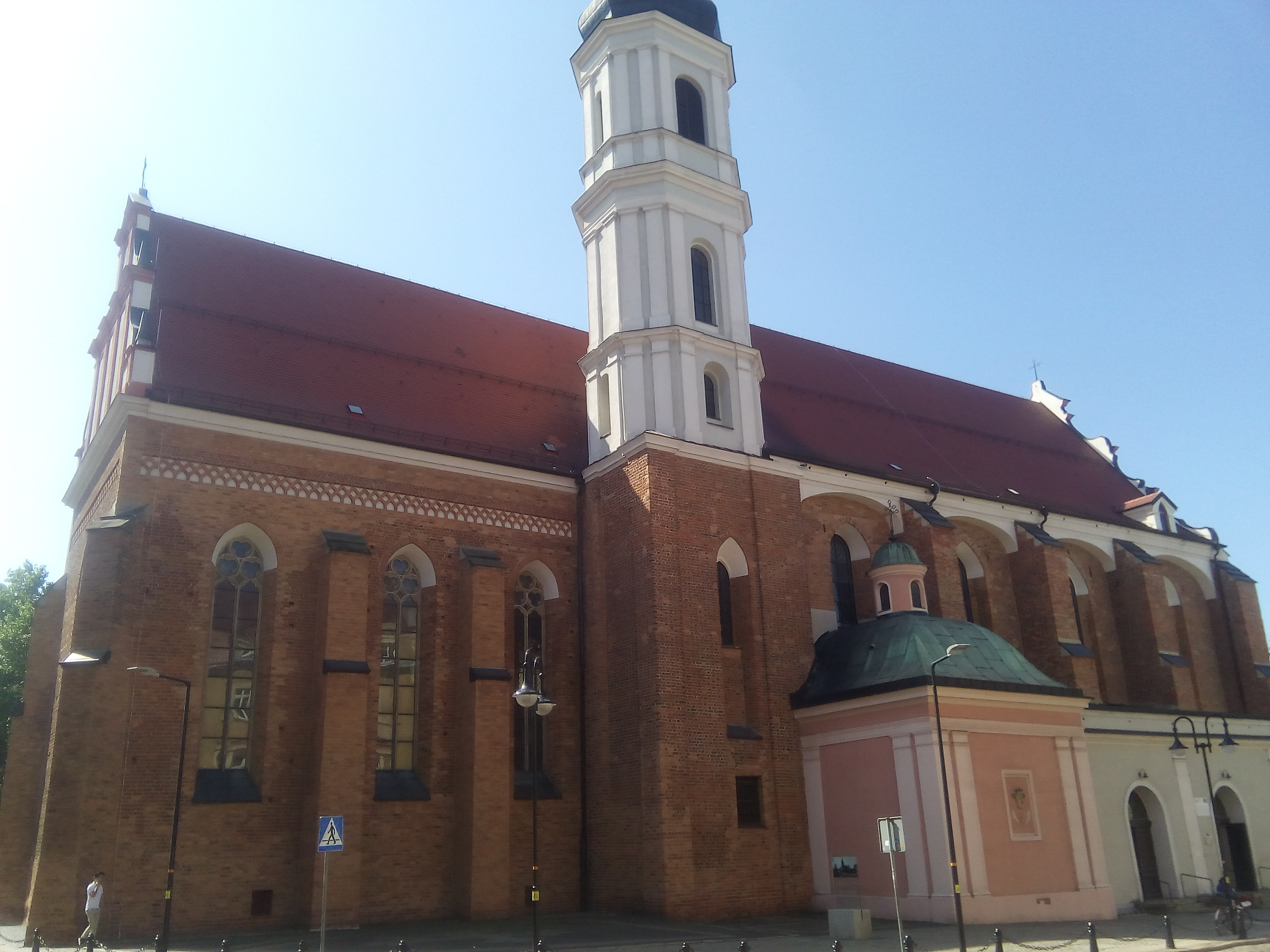 Klášter Františkánů (Opole)